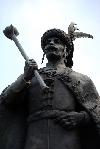 vajai Ibrányi László (1658-1707), colonel Kuruc tué à Trenčín en actuelle Slovaquie.